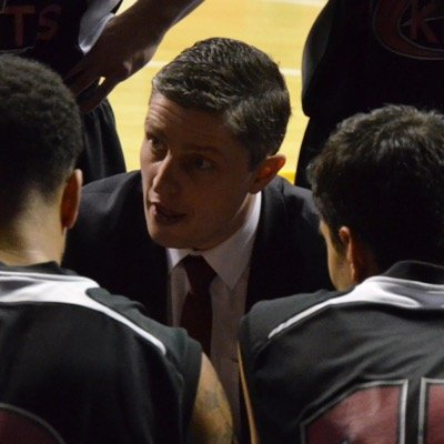 Manuel Peña en Tiempo Muerto Final Copa Inglesa 2015